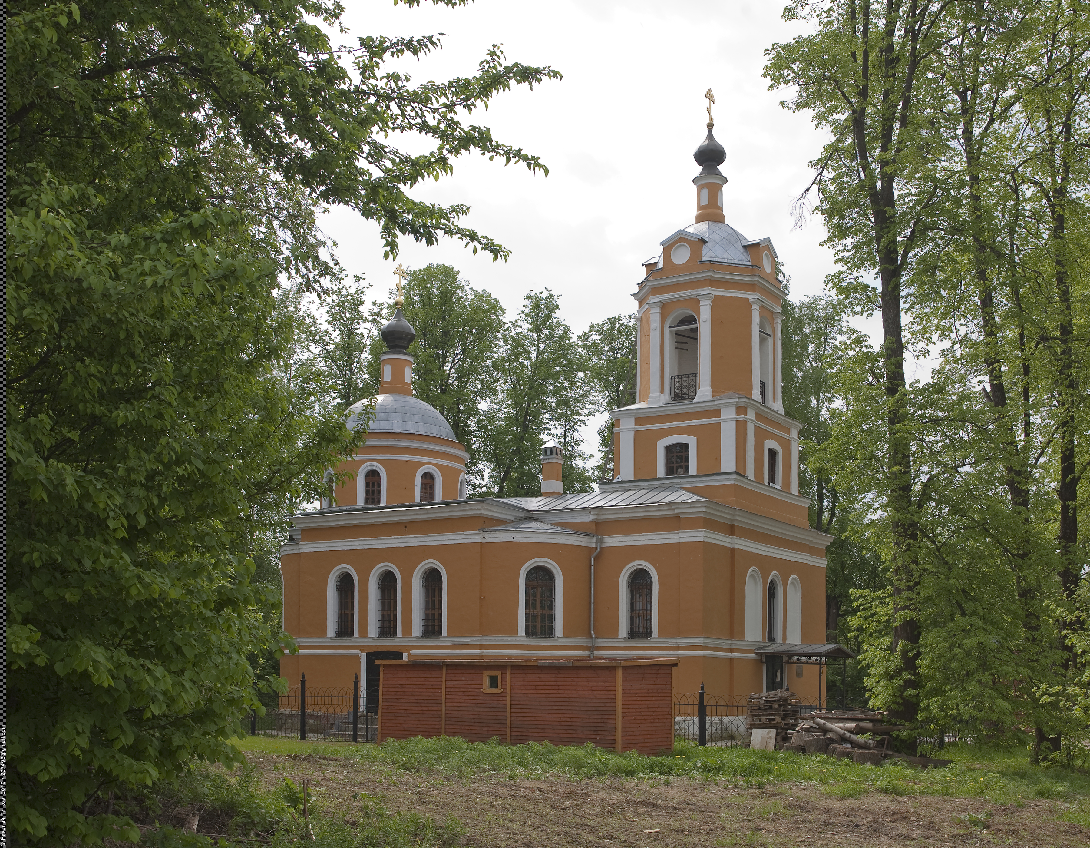 Храм Спаса Нерукотворного образа в селе Спас-Торбеево Сергиев-Посадского района Московской области